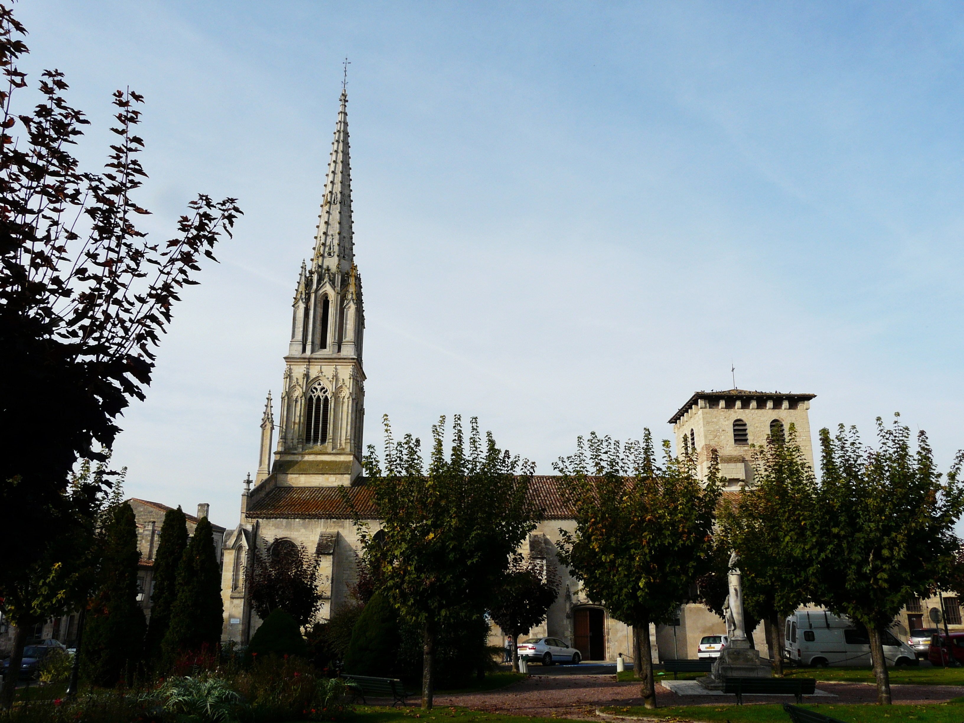 Église Saint-Jean-Baptiste, Coutras, Gironde, France Object location45° 02′ 27.4″ N, 0° 07′ 48″ W